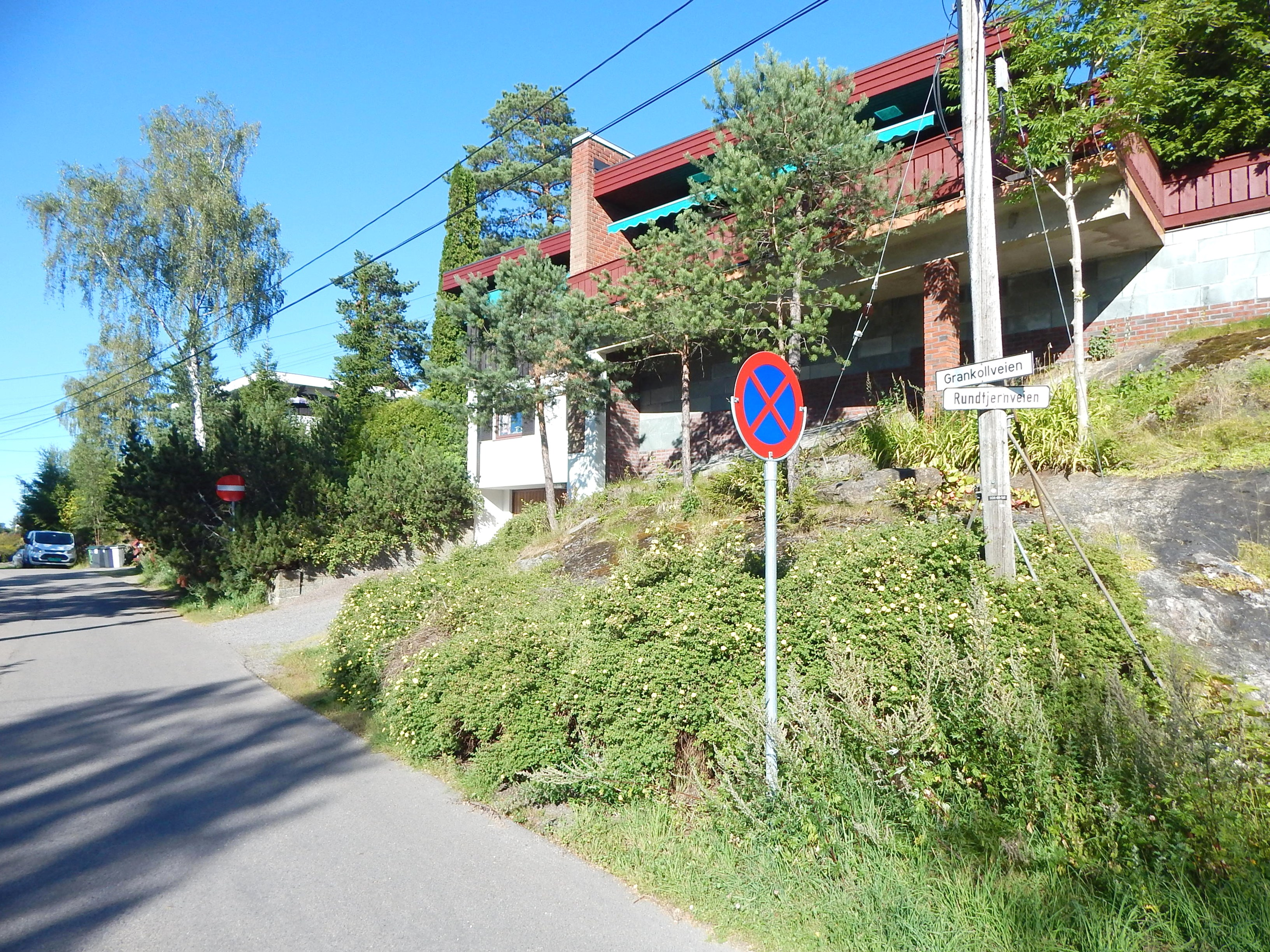 Grankollveien sett fra Rundtjernveien